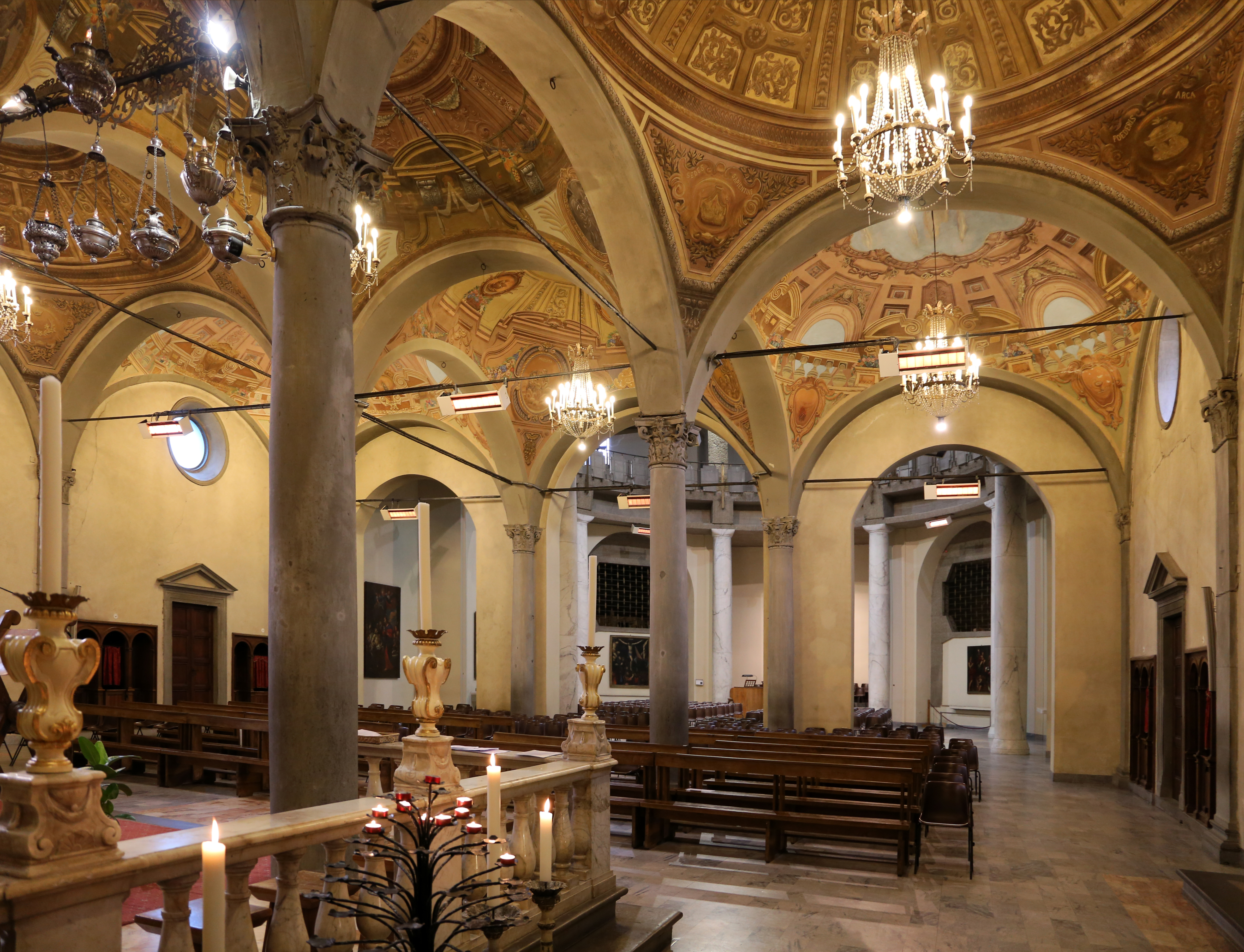 Centro Storico di San Giovanni Valdarno This is a photo of a monument which is part of cultural heritage of Italy.